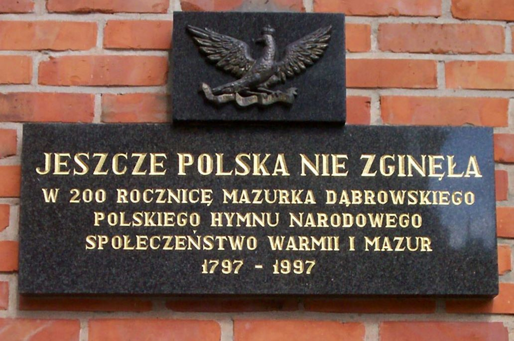 Tablica pamiątkowa na Domie Gazety Olsztyńskiej w Olsztynie, ufundowana w 200 rocznicę Mazurka Dąbrowskiego